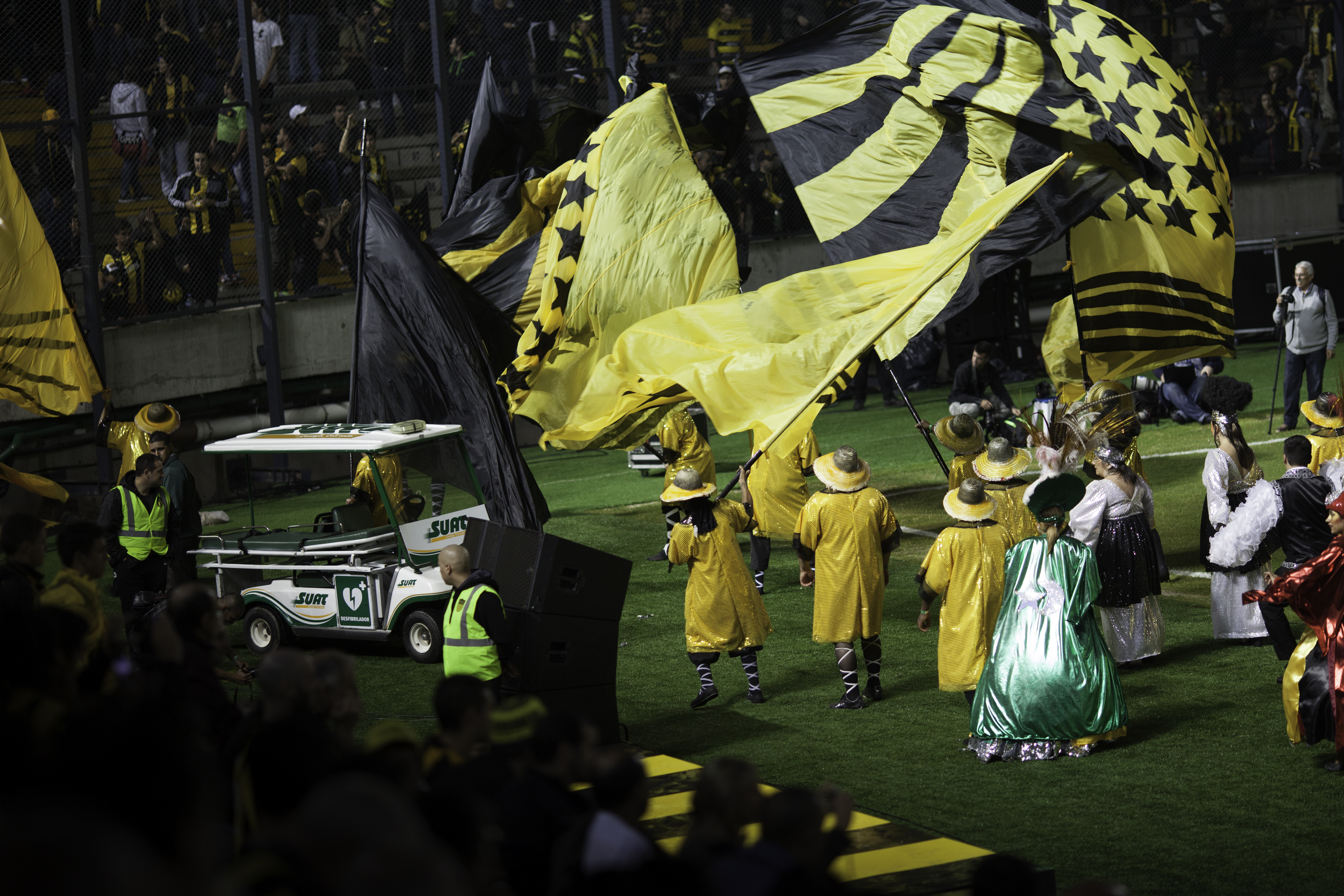 "Si Peñarol fue el primer campeón del mundo que vio América y el primer campeón Uruguayo, tenía que tener el primer estadio FIFA" Camera: Canon EOS 5D Mark II 0 ISO: 800